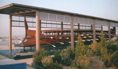 Nachbau einer attischen Triere, heute im Schiffsmuseum Trokadero Marina in Palaio Faliro, Athen